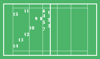 Composition d'une équipe de Rugby par moi-même